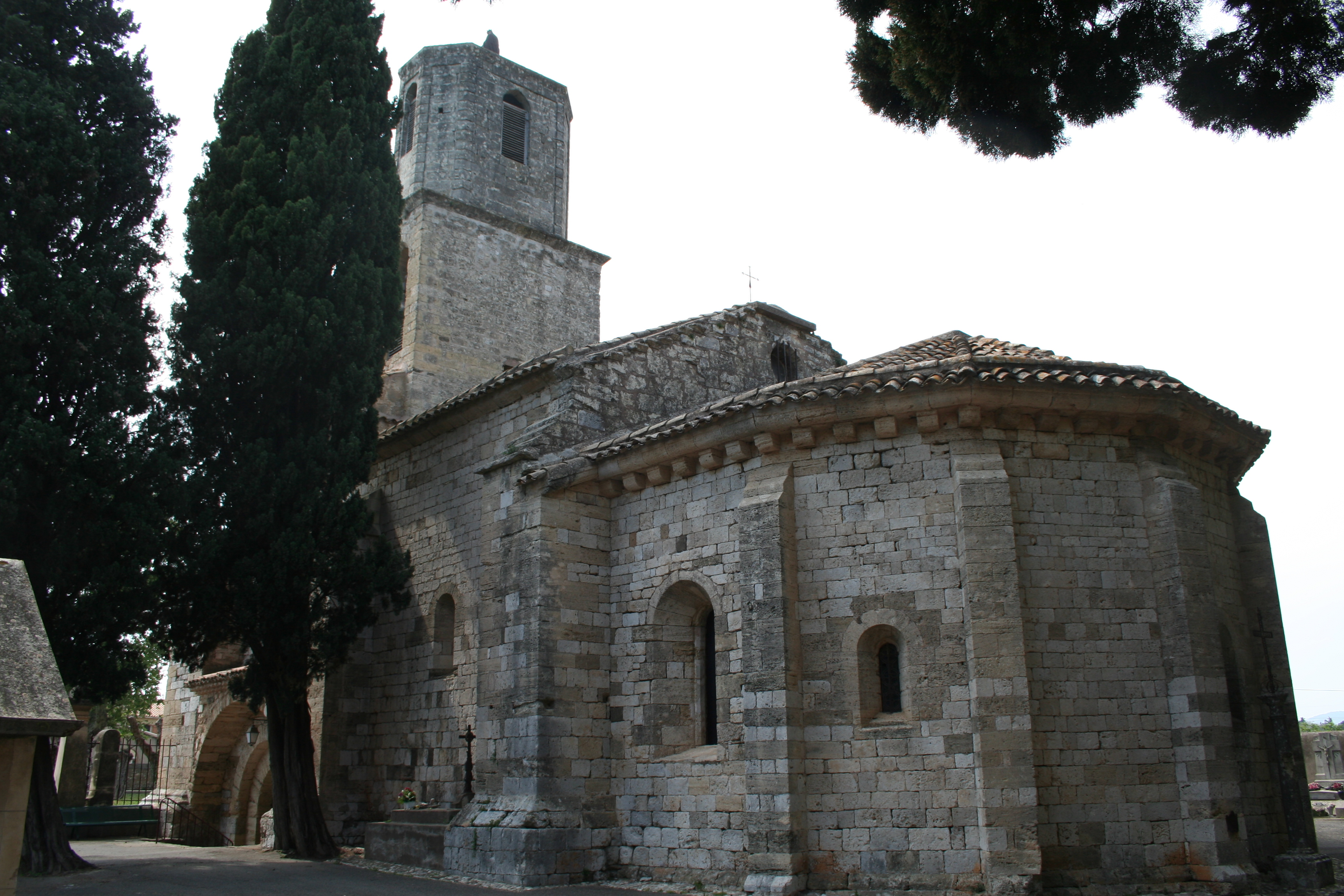 Paulhan (Hérault) - Chevet de l'église Notre-Dame des Vertus.